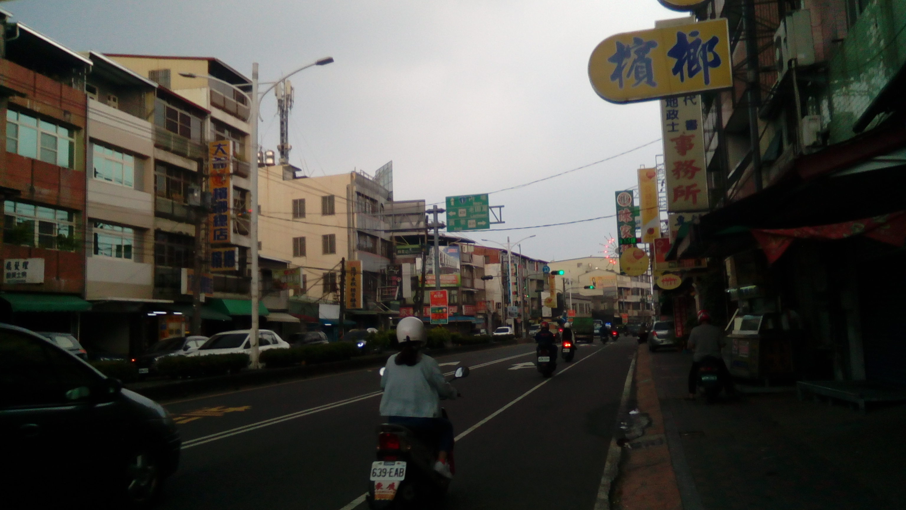 台一線麟洛段 近鄉公所